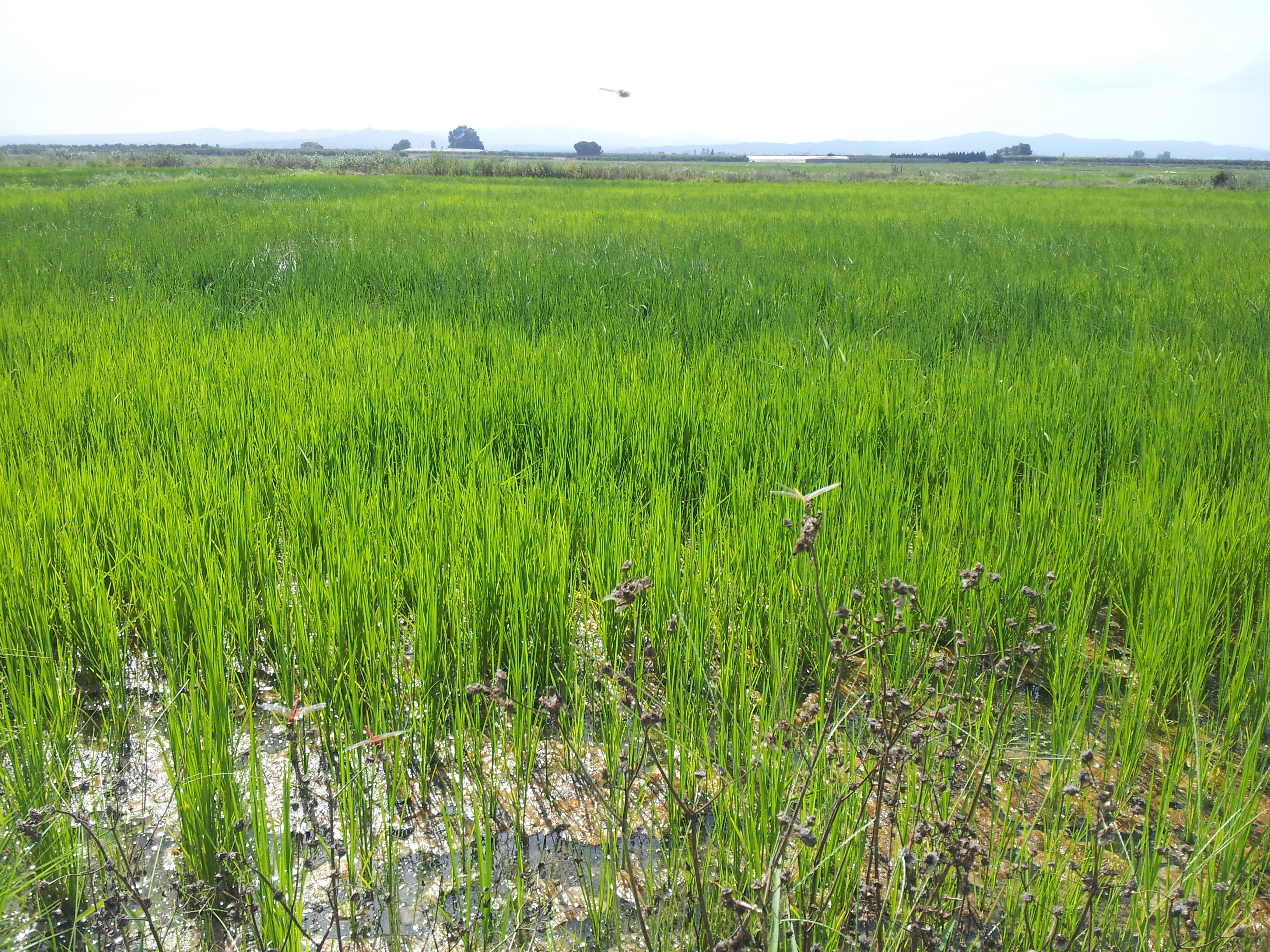 Camps d'arròs al terme de Sollana. Apareixen uns xicotets insectes no identificats.